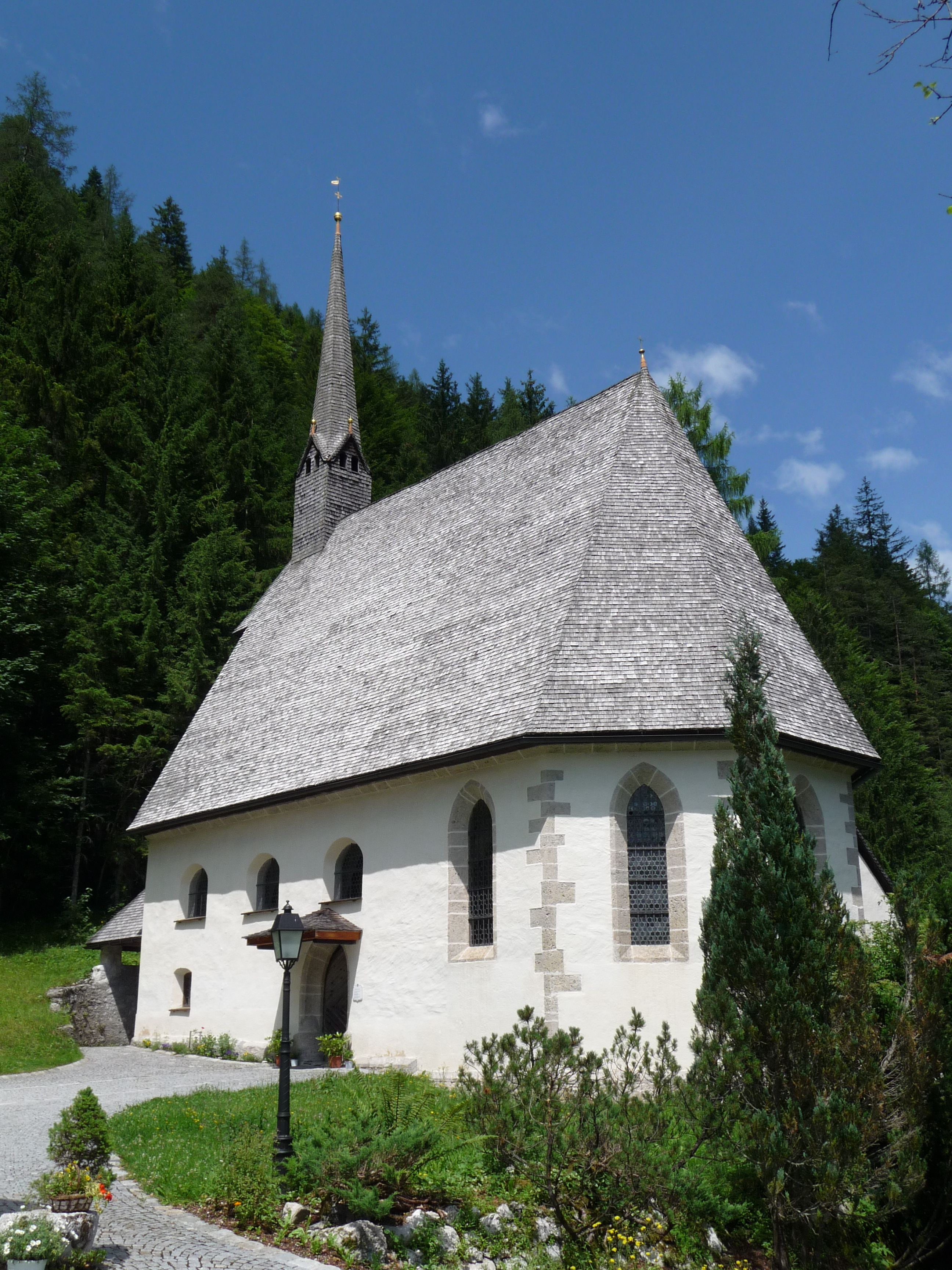 St. Adolari-Kapelle